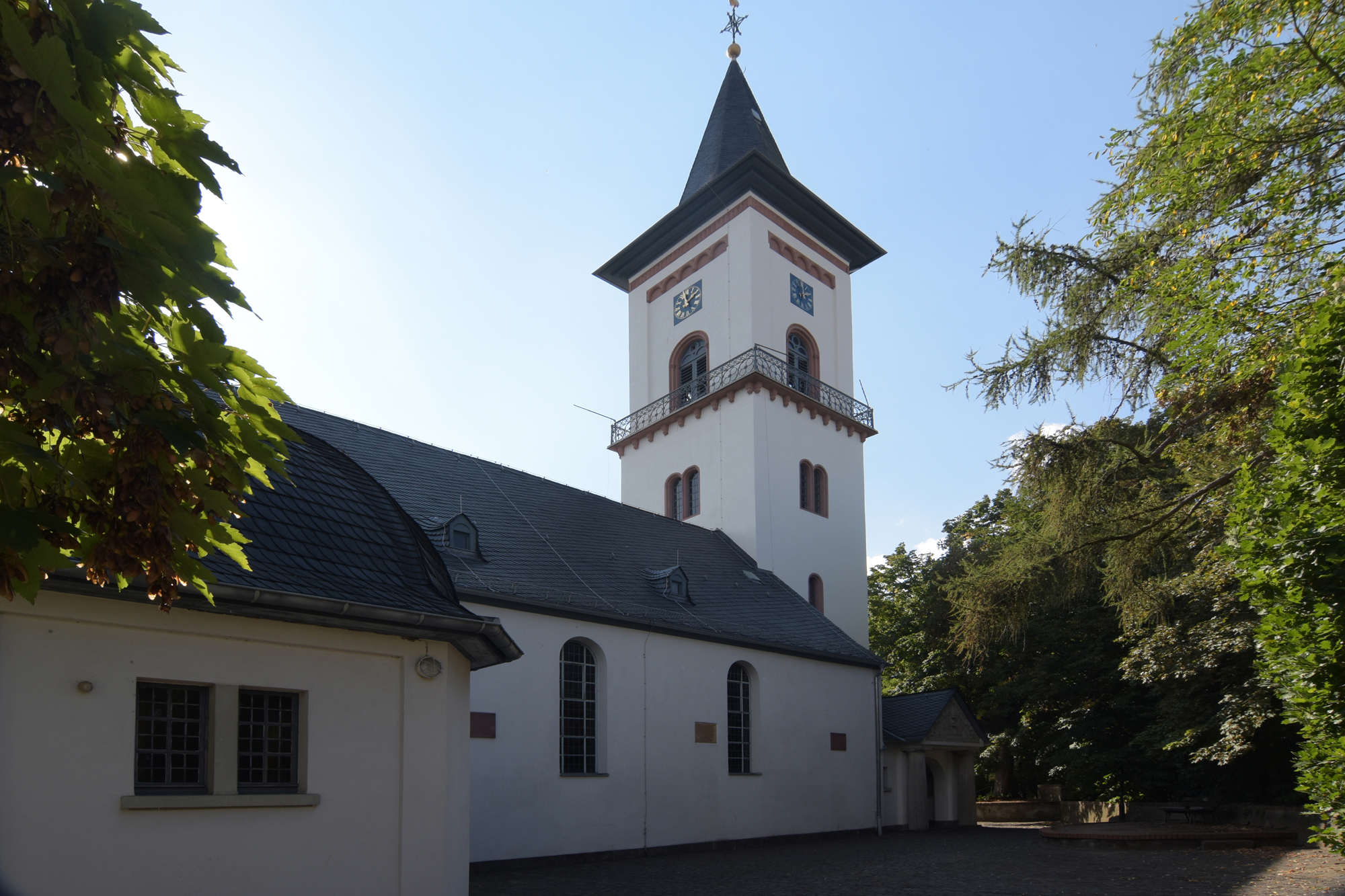 Denkmalgeschützte evangelische Dreifaltigkeitskirche in Darmstadt-Eberstadt